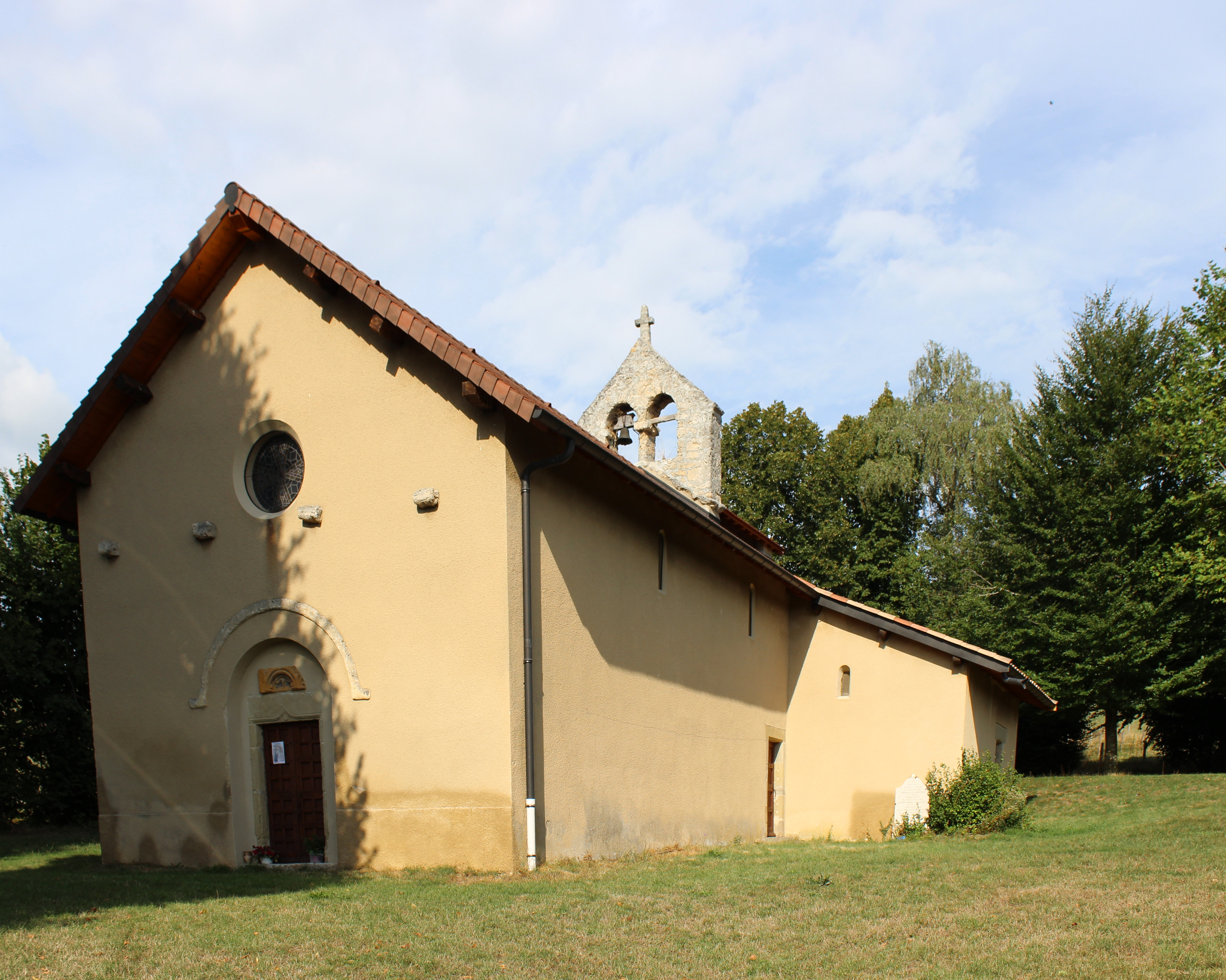 Chapelle Notre-Dame de Milin à Burcin.